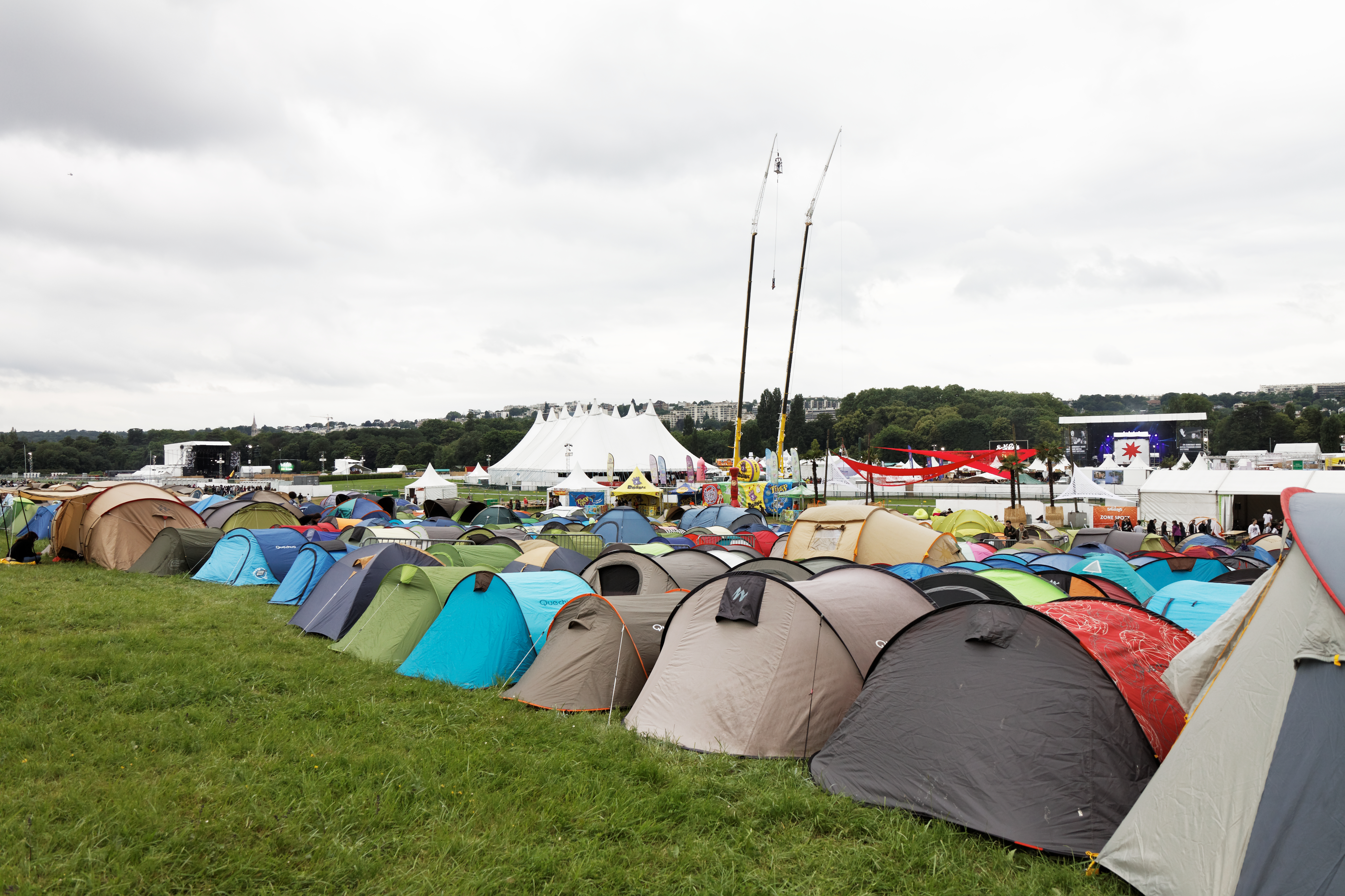 Le camping du festival.